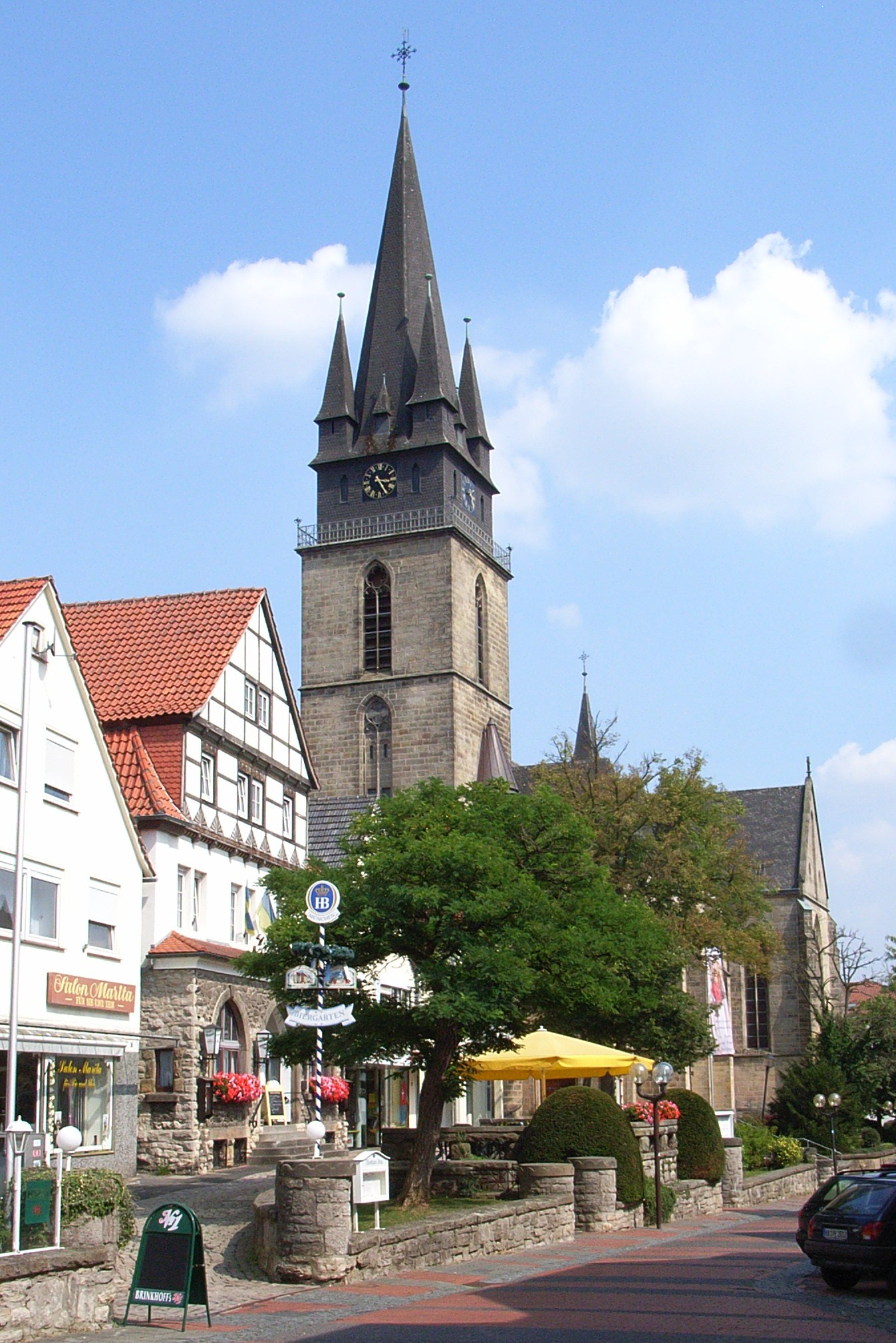 St. Peter und Paul in Bad Driburg, gesehen von Westen.